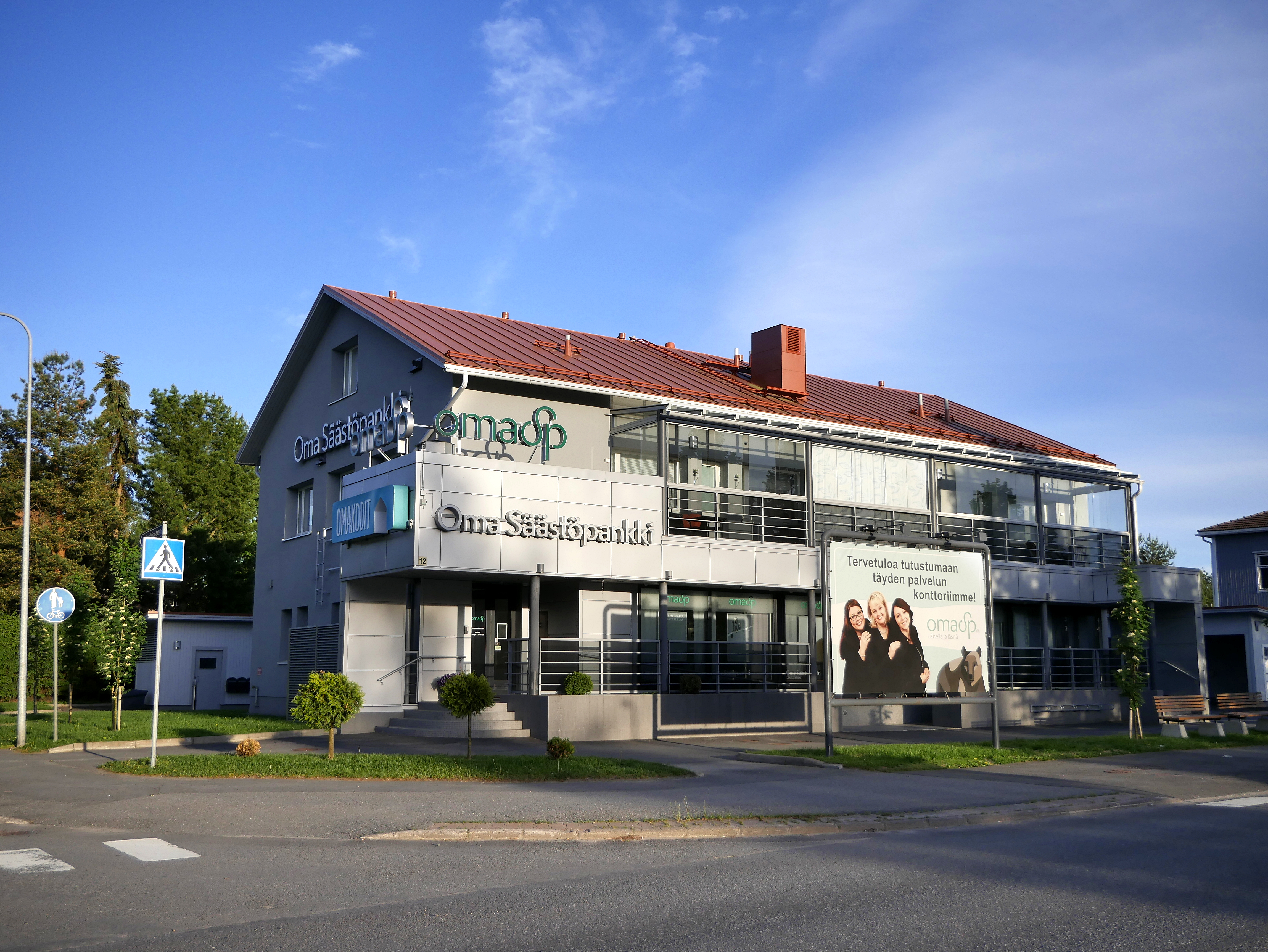 Ilmajoen Oma Säästöpankki.